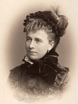 Sophie Laeisz (1831-1912), Ehefrau des Reeders und Unternehmers Carl Laeisz, in jüngeren Jahren